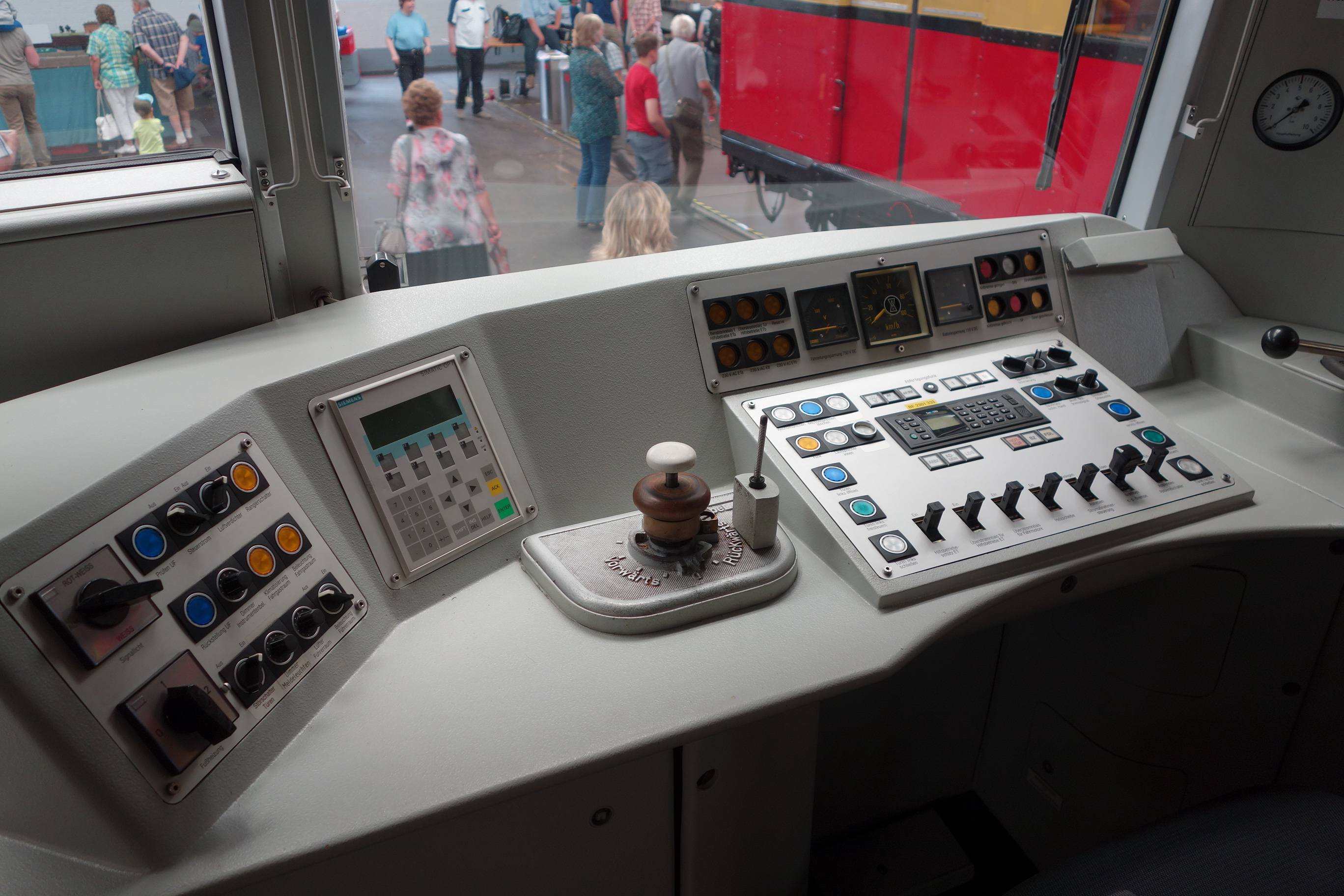 Panorama-S-Bahn der S-Bahn Berlin in der Triebwagenhalle Erkner, Führerstand